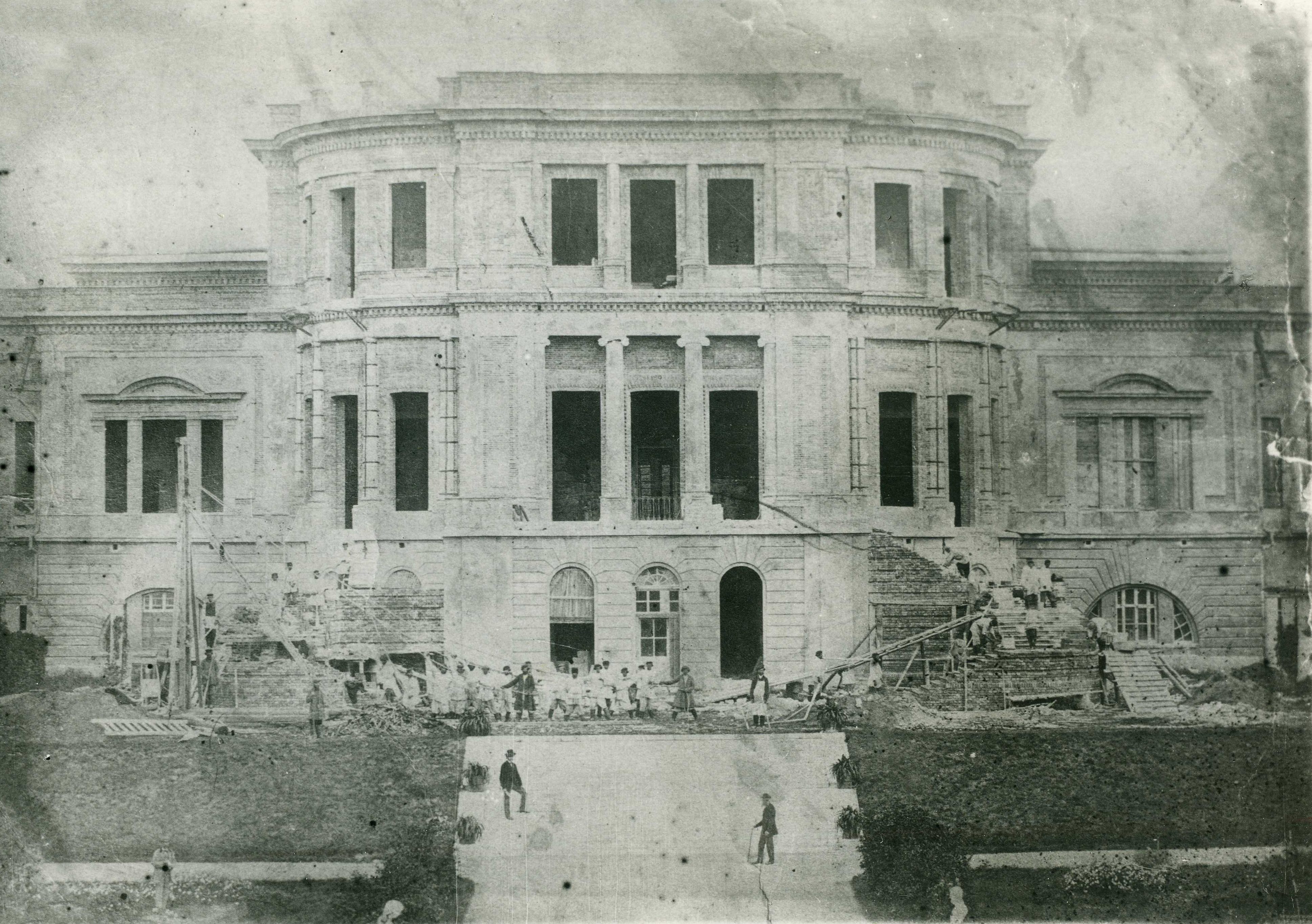 Реконструкция Марьино 1870е годы